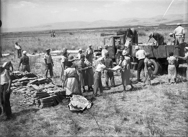 רמת יוחנן - הנחת אבן היסוד לבית הספר.